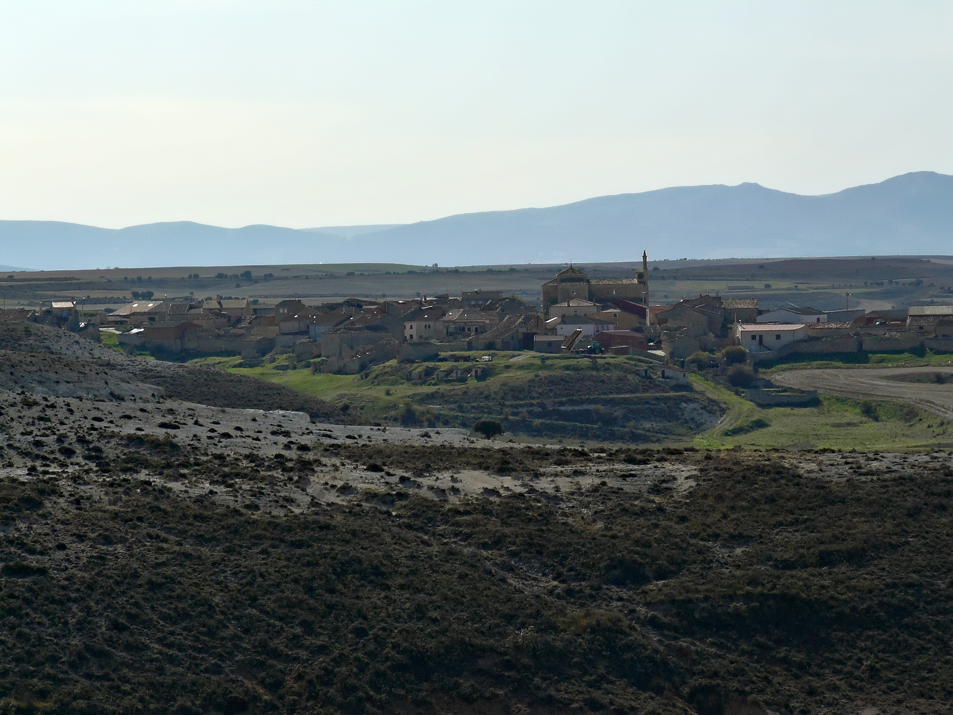 Fuentecambrón